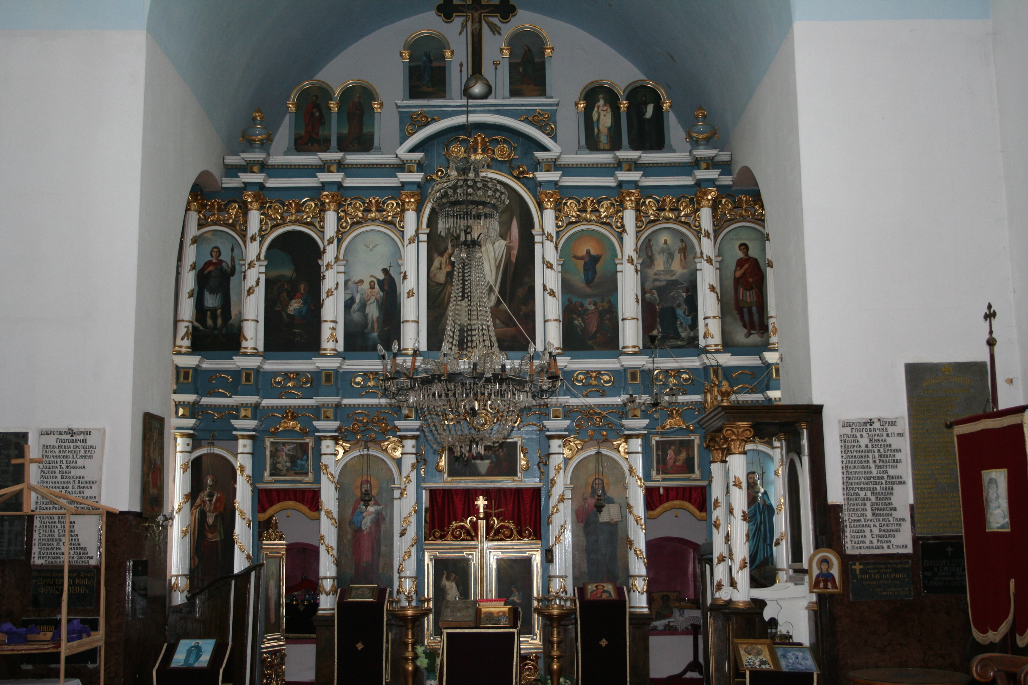 Crkva Sv. Petra i Pavla, Glogovac